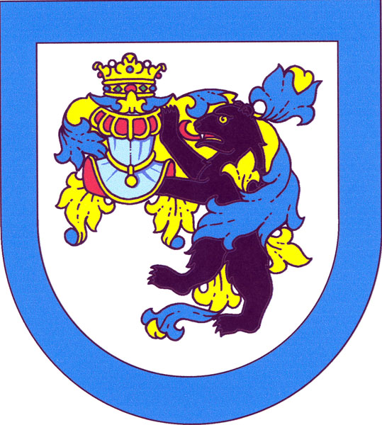 Znak obce Jarošov nad Nežárkou